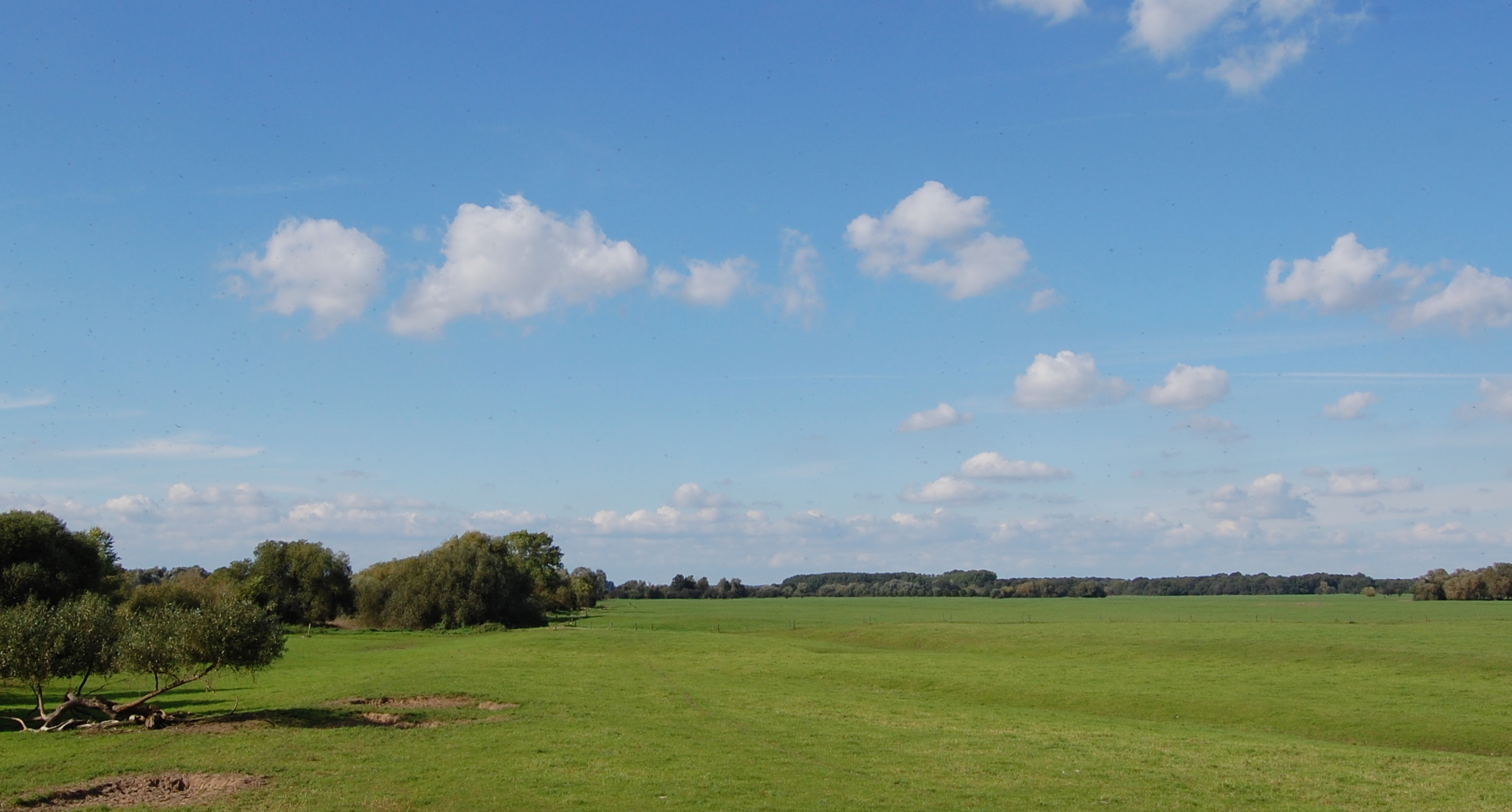 Blick vom Greifenwerder aus (Trafostation) nach Norden über den Kapitelwerder